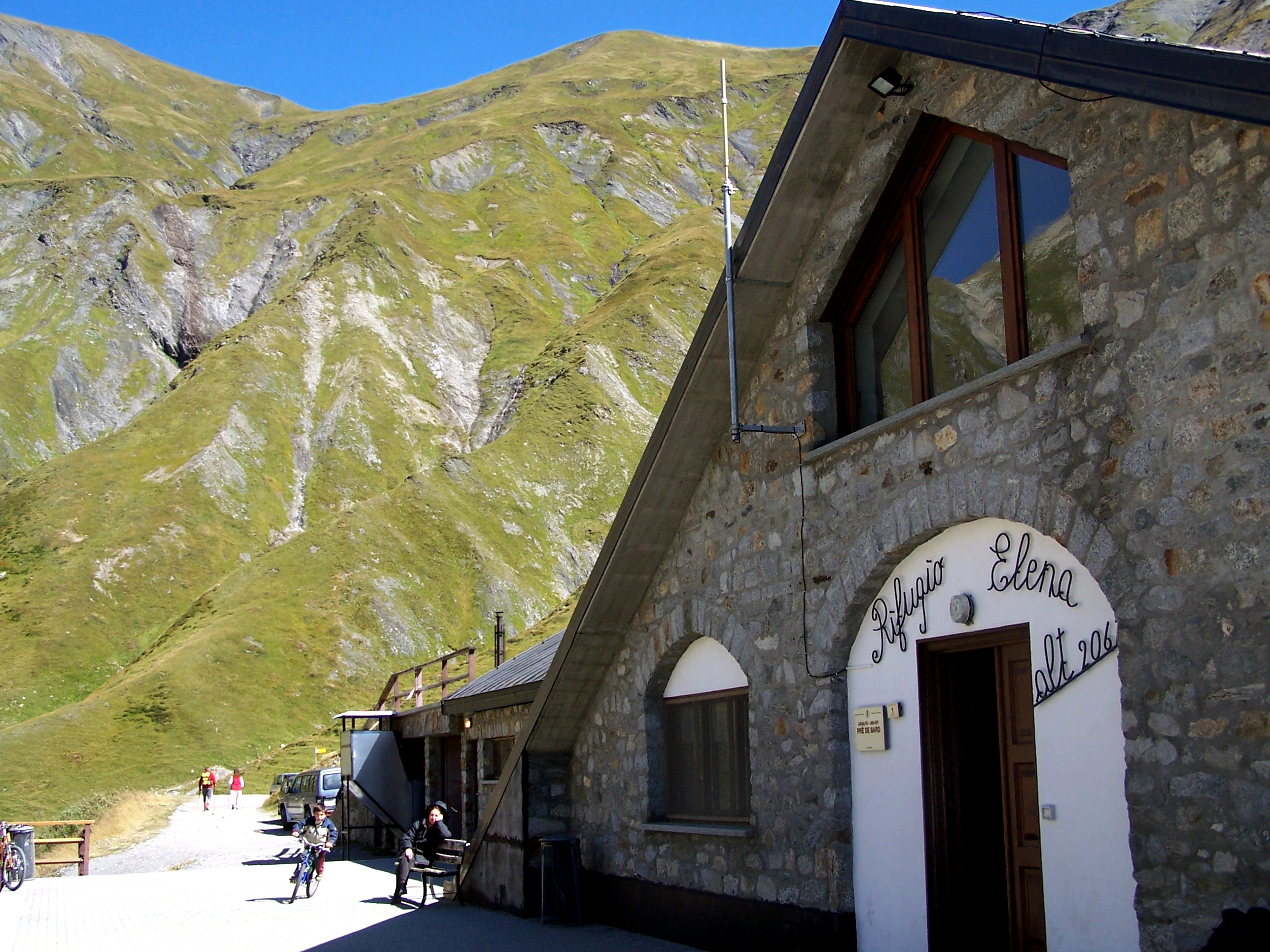 Rifugio Elena, Val Ferret, Italy